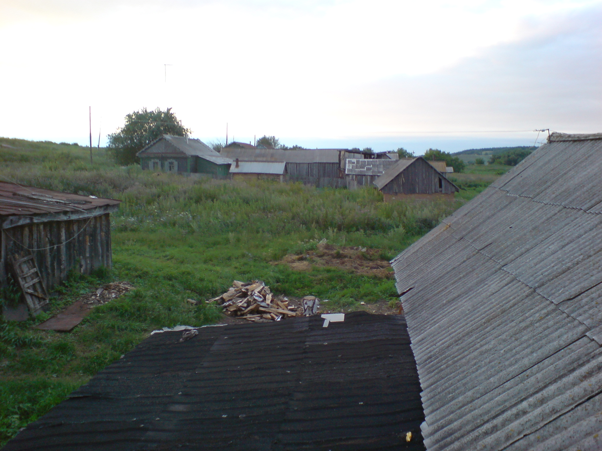 Нижний Курмей, вид на северную окраину деревни